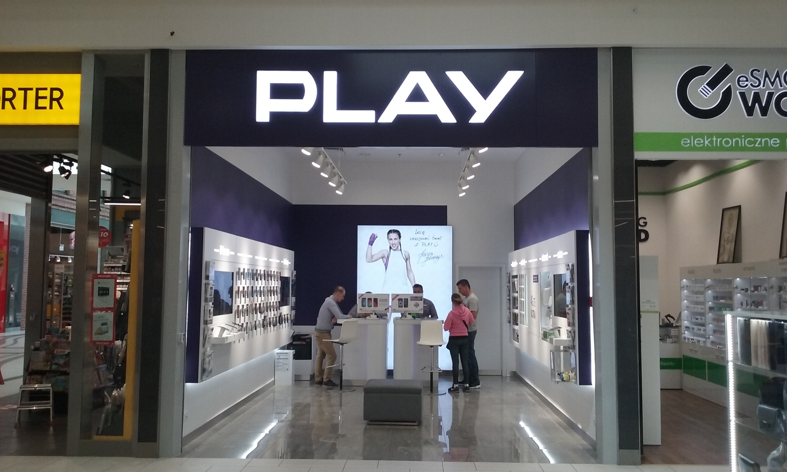 Salon Play w sześćdziesięcio tysięcznym Tomaszowie Mazowieckim w województwie łódzkim. Galeria "Tomaszów"